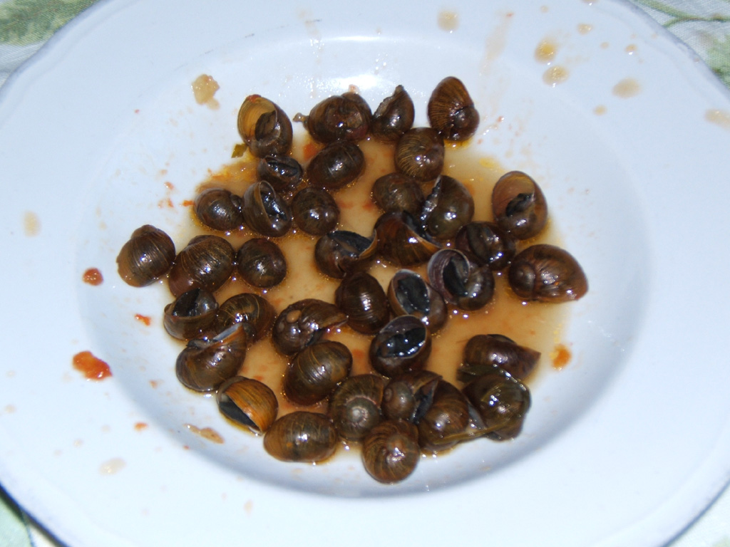 piatto tipico salentino foto by me my photo